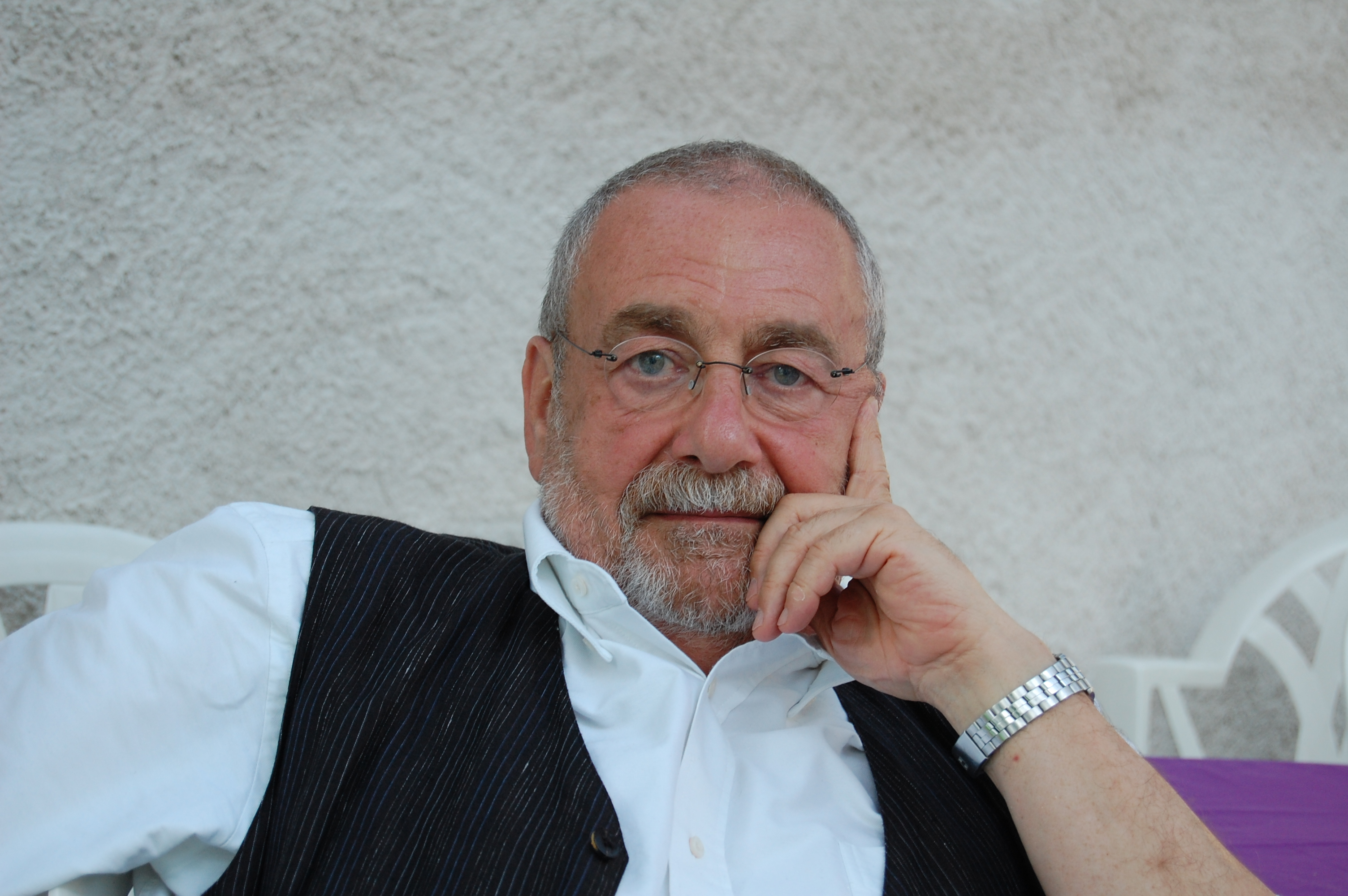 Jean-Pierre Digard (2009)